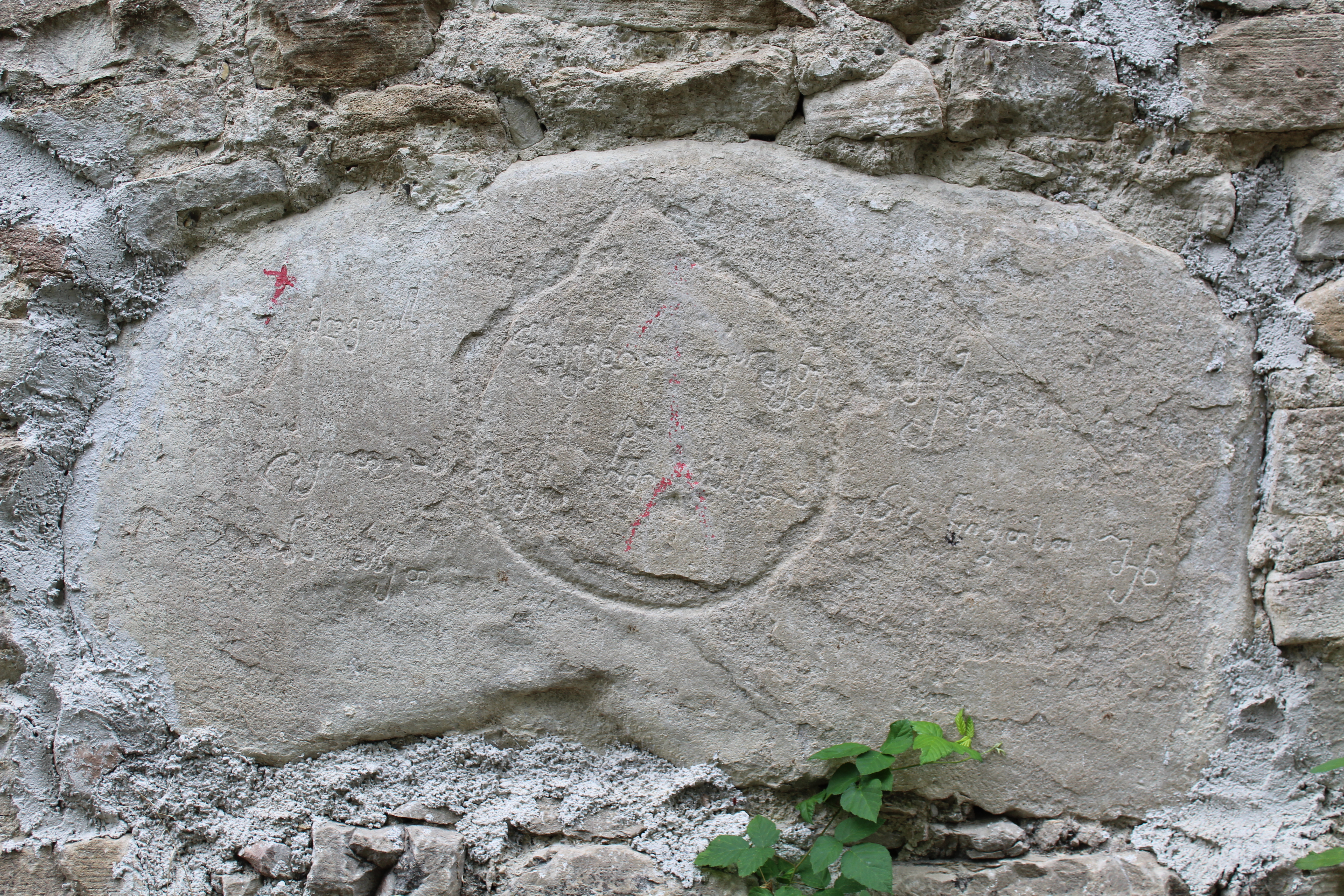 ჭერემის წმინდა გიორგის ეკლესიის წარწერა